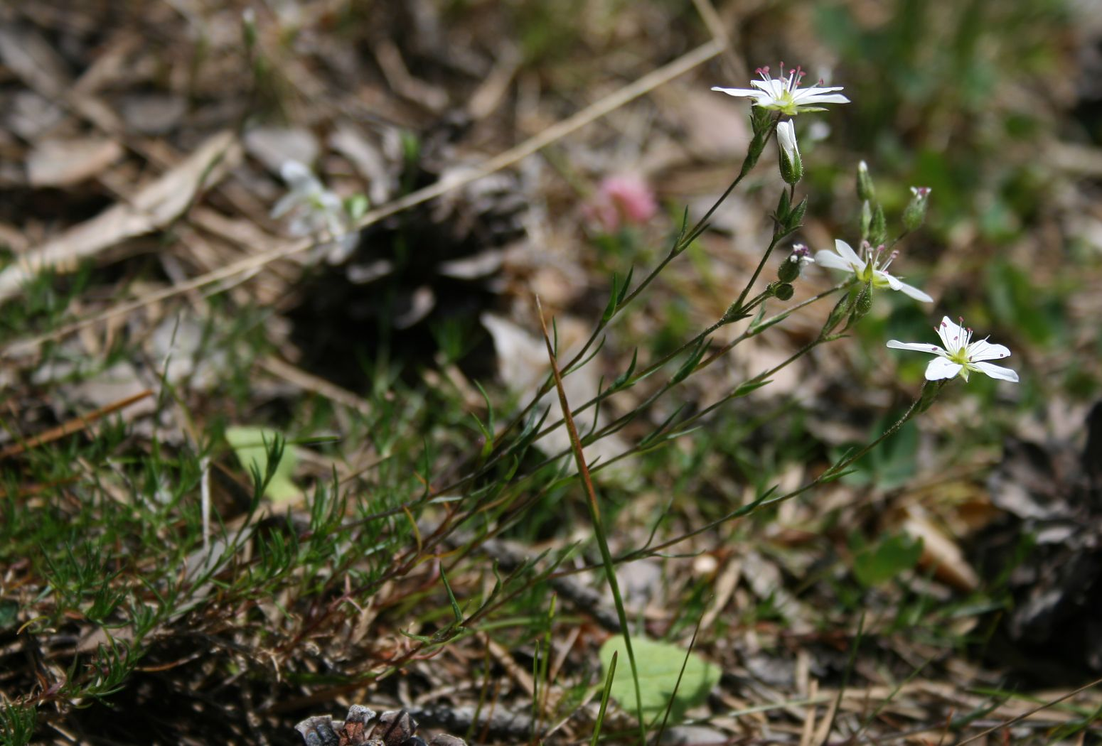 Minuartia hirsuta subsp. falcata, Nelkengewächse (Caryophyllaceae) - Türkei/Türkiye/Turkey: Prov. Bolu/Bolu ili, Köroğlu Dağları, 19-20 km S Bolu, an der Straße nach Kıbrıscık, 1450-1500 m